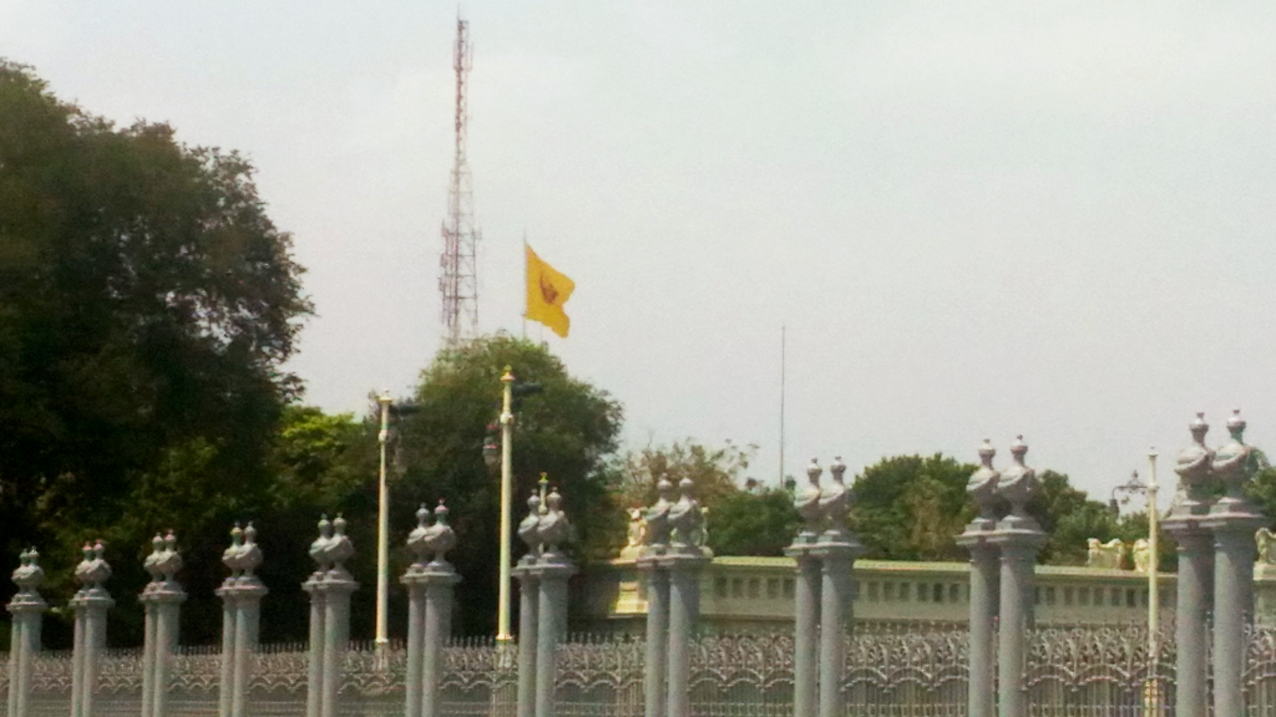 ธงมหาราชโบกสะบัด ณ พระที่นั่งอัมพรสถาน พระราชวังดุสิต ถ่ายจากลานพระราชวังดุสิต